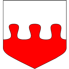 Coupé nébulé d'argent et de gueules